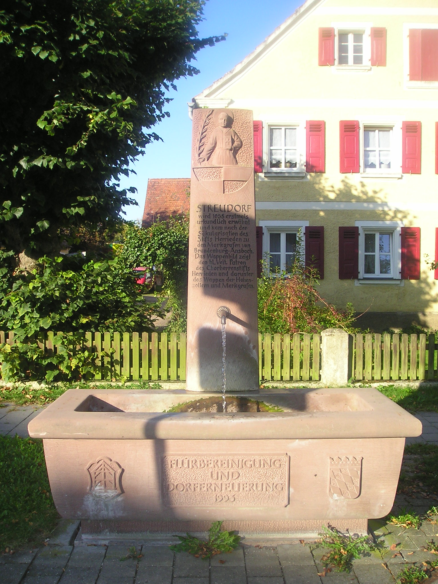 Brunnen in Streudorf, Ortsteil von Gunzenhausen im Landkreis Weißenburg-Gunzenhausen, Bayern